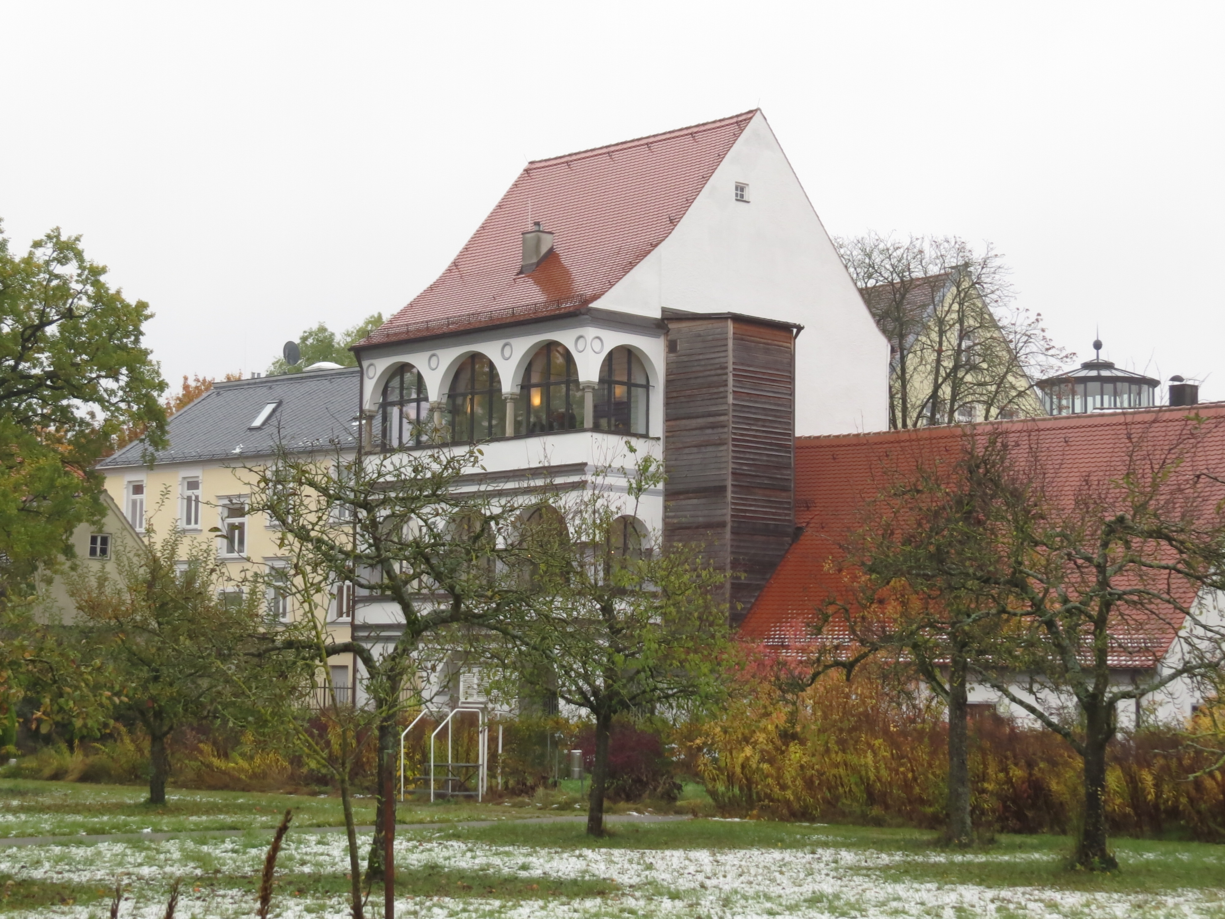 Der Blick auf das Wieselhaus (Fugger und Welser Erlebnismuseum) im ehemaligen Garten der Karmeliter in Augsburg, heute genutzt von St. Stephan.